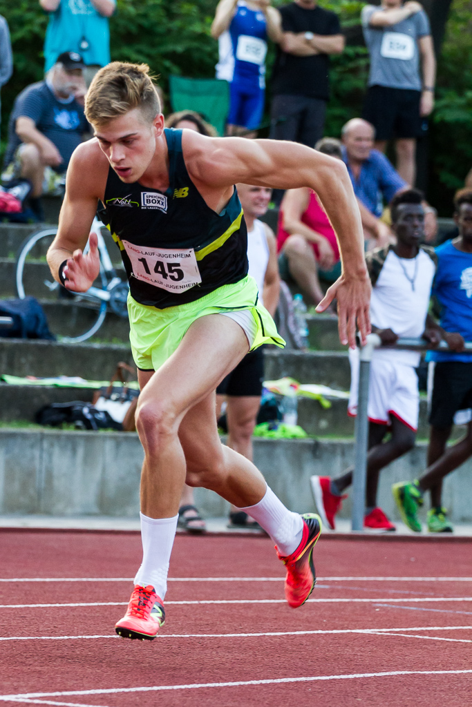 Abendsportfest des TSV Pfungstadt am 5. Juli 2017.